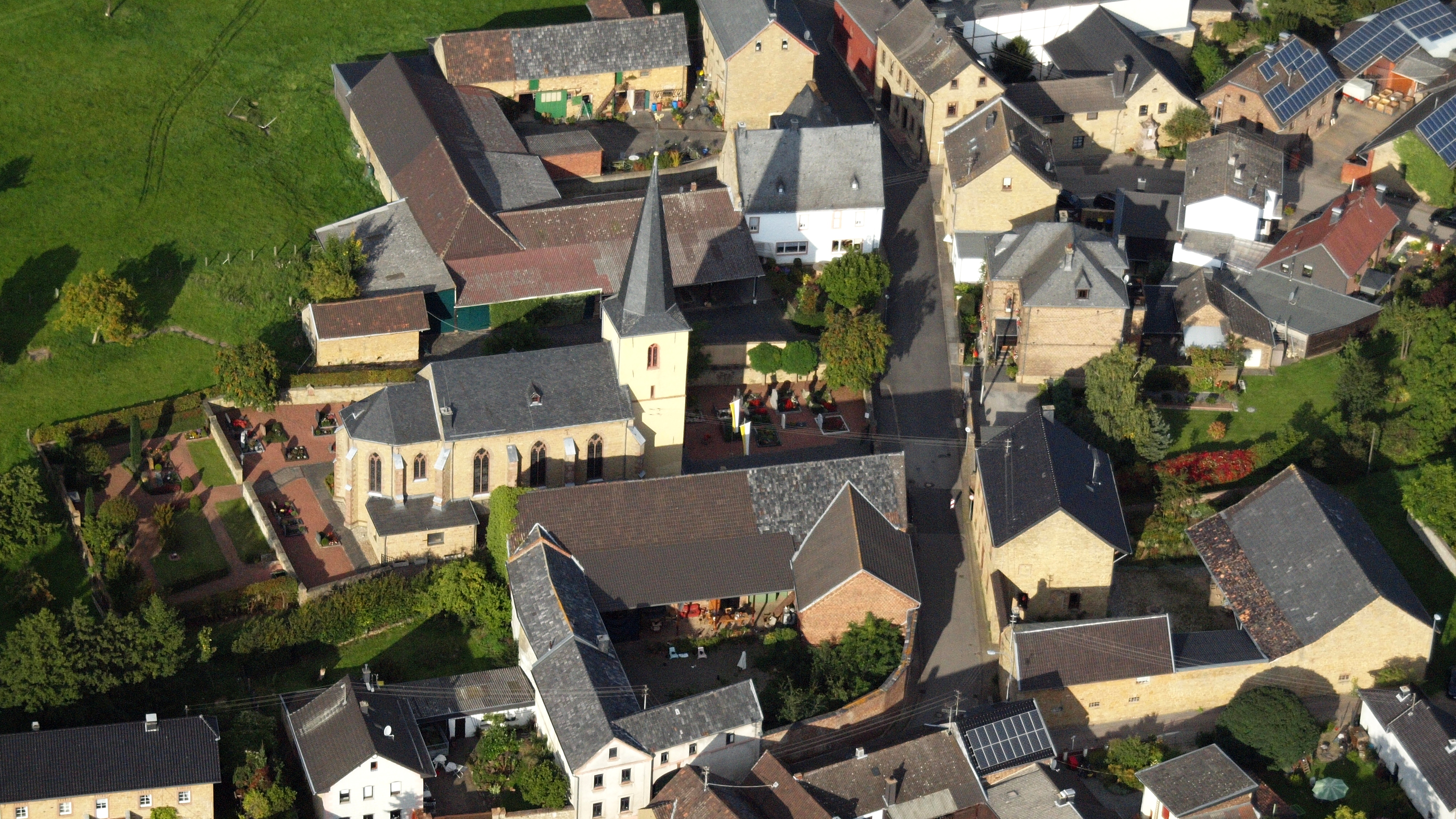 Muldenau, Pfarrkirche Sankt Barbara, Luftaufnahme (2015)